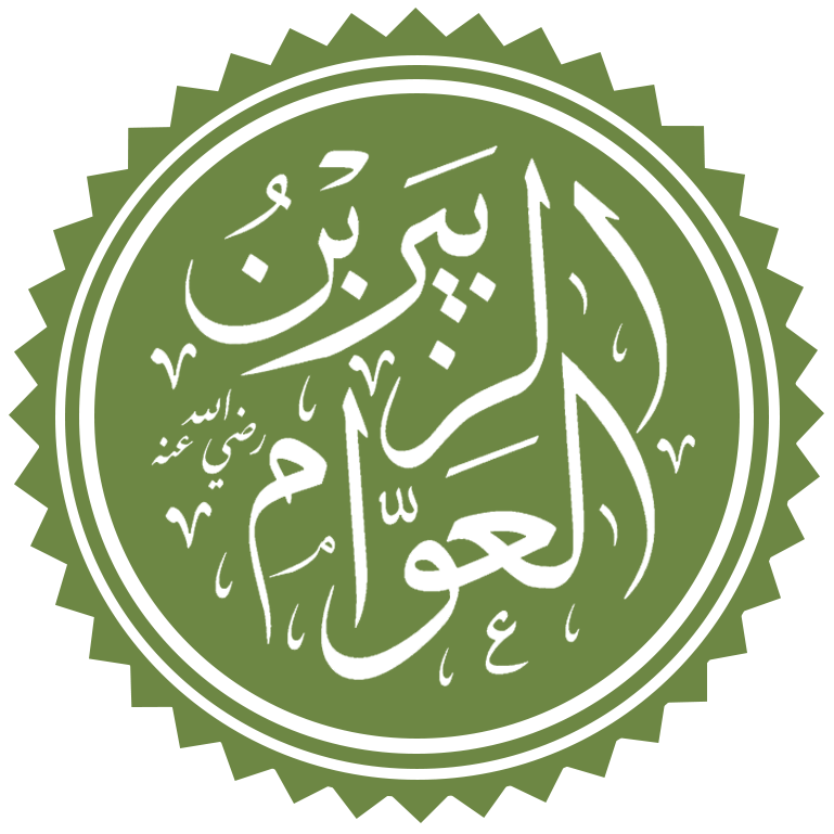 تخطيط اسم الزبير بن العوام رضي الله عنه حواري رسول الله صلي الله عليه وسلم